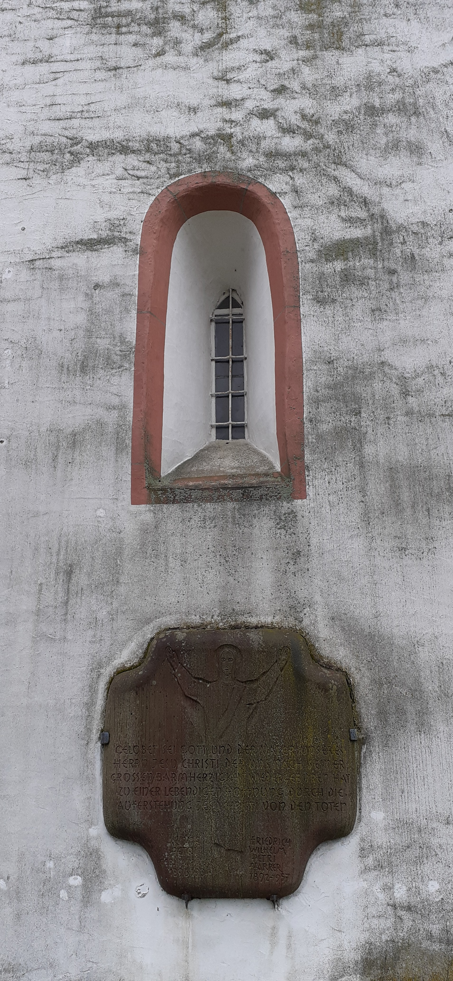 Fenster und Grabstein am Turm der Evangelischen Kirche Großaltenstädten